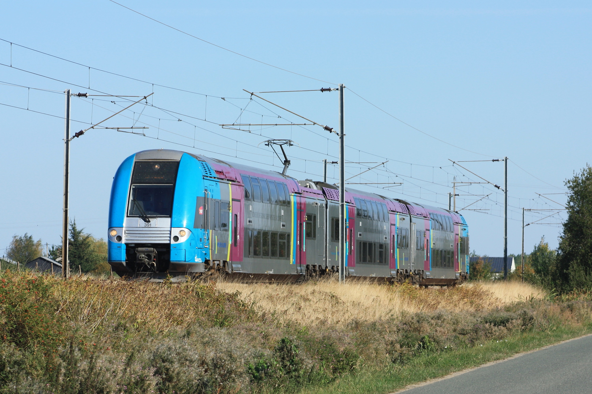 La rame TER 2N NG n° 391 sur un TER Tours - Le Croisic à La Bohalle